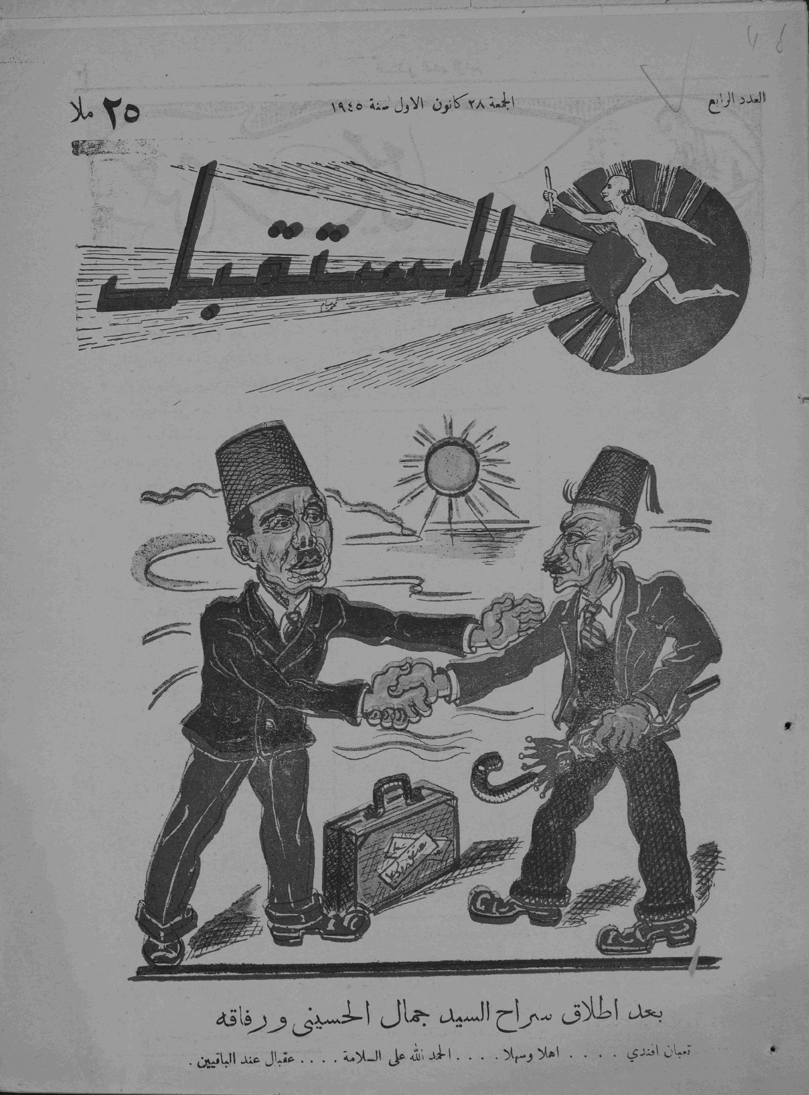 مجلة فلسطينية